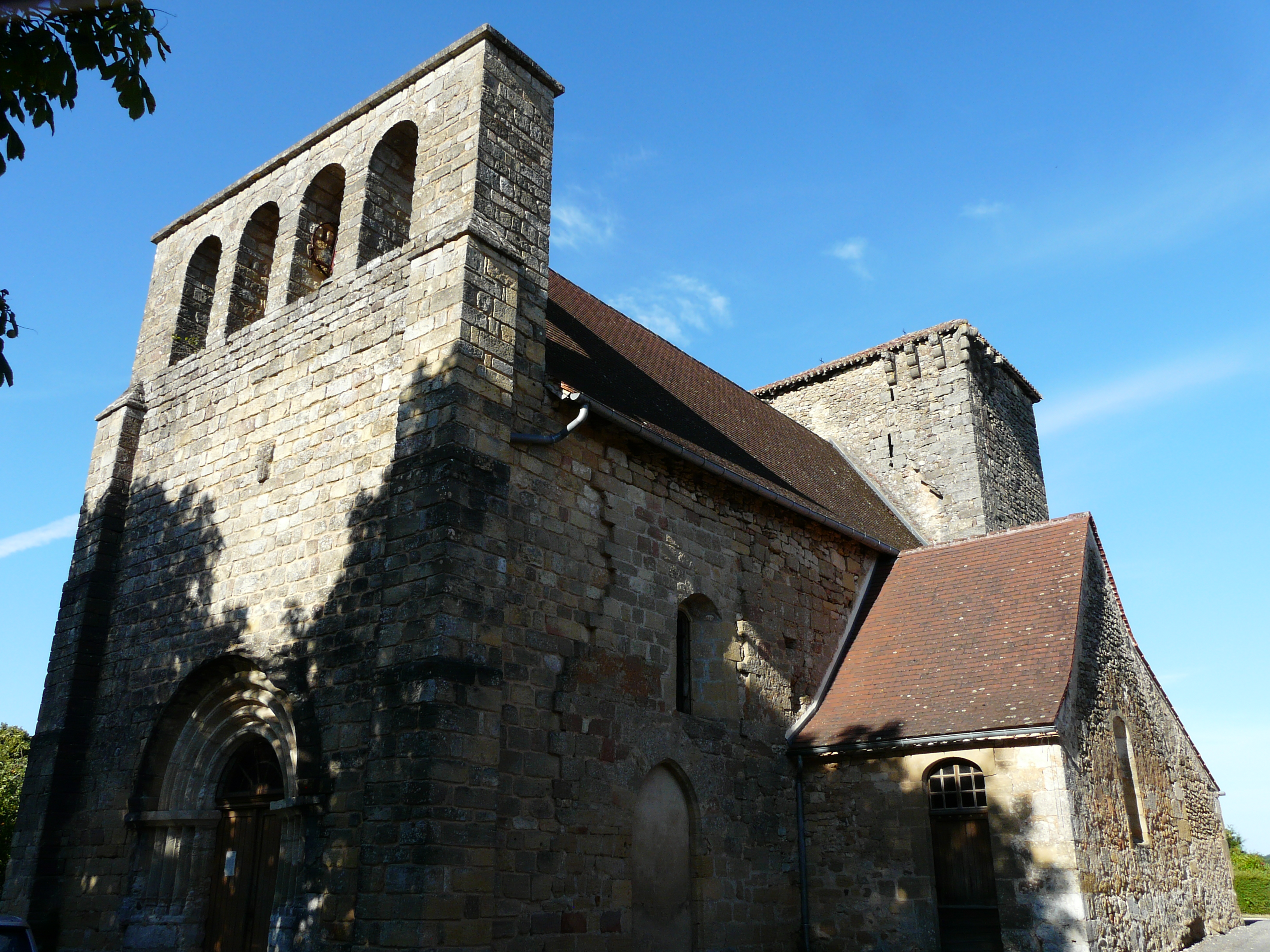 L'angle sud-ouest de l'église Sainte-Marie, Fleurac, Dordogne, France.